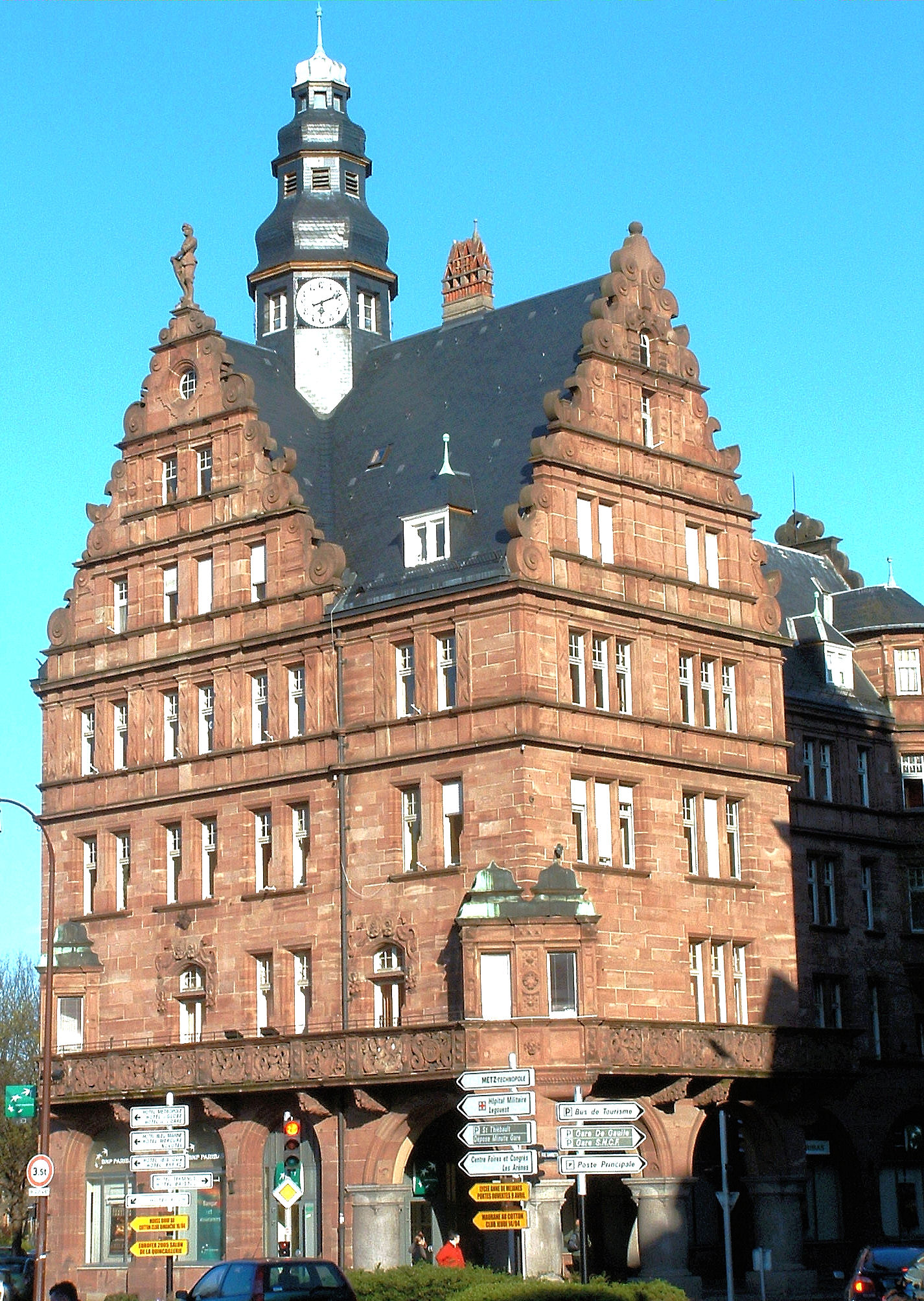 Metz - Maison de la fédération des corporations